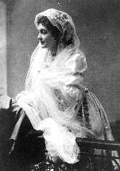 Nagy Ibolya magyar színésznő. A Nemzeti Színház örökös tagja.